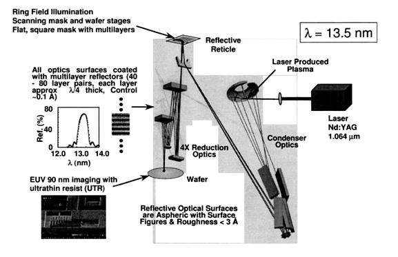 شکل 1- شماتیکی از اجزای اصلی دستگاه EUVL